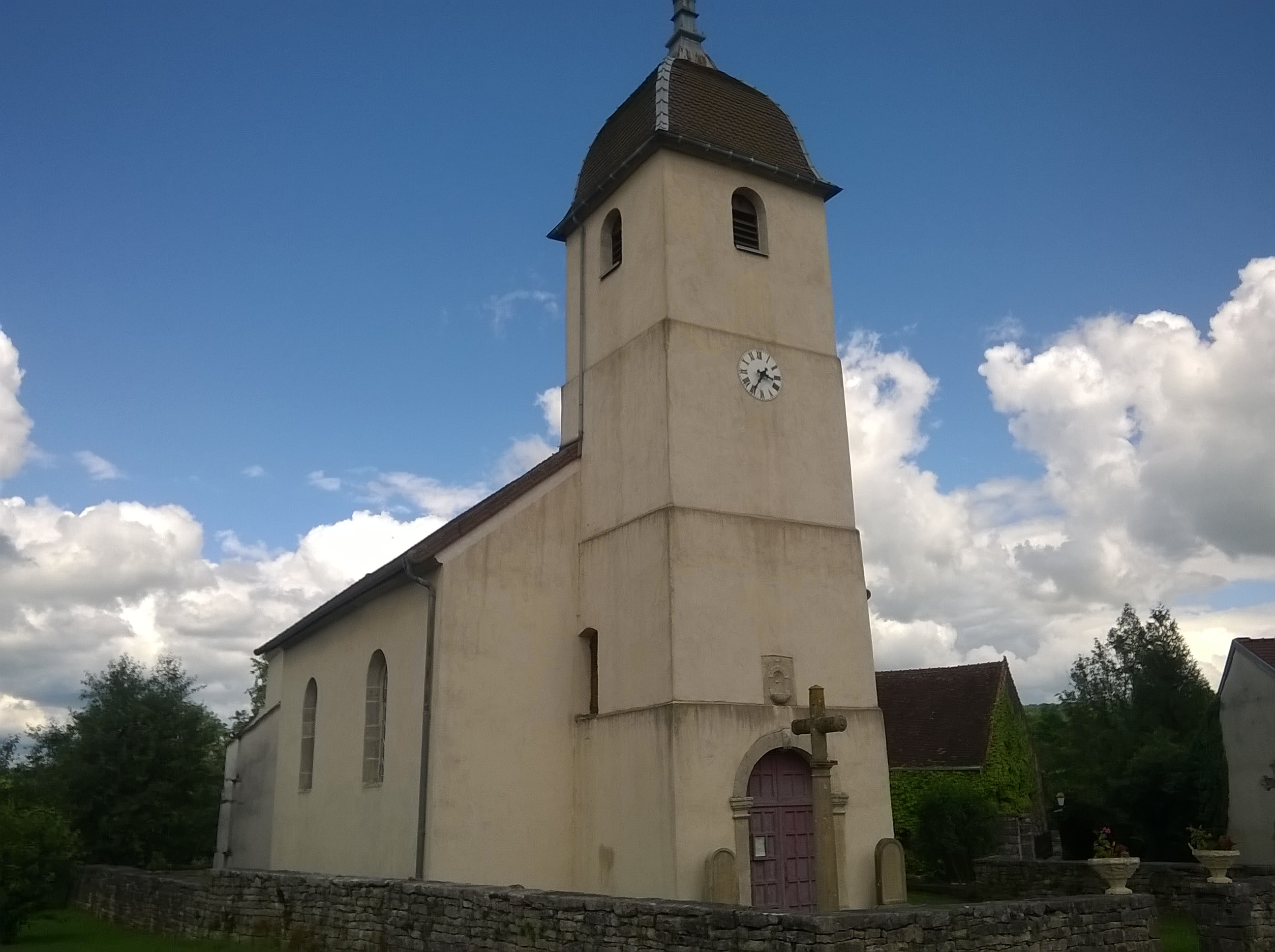 Dampvalley-lès-Colombe Eglise